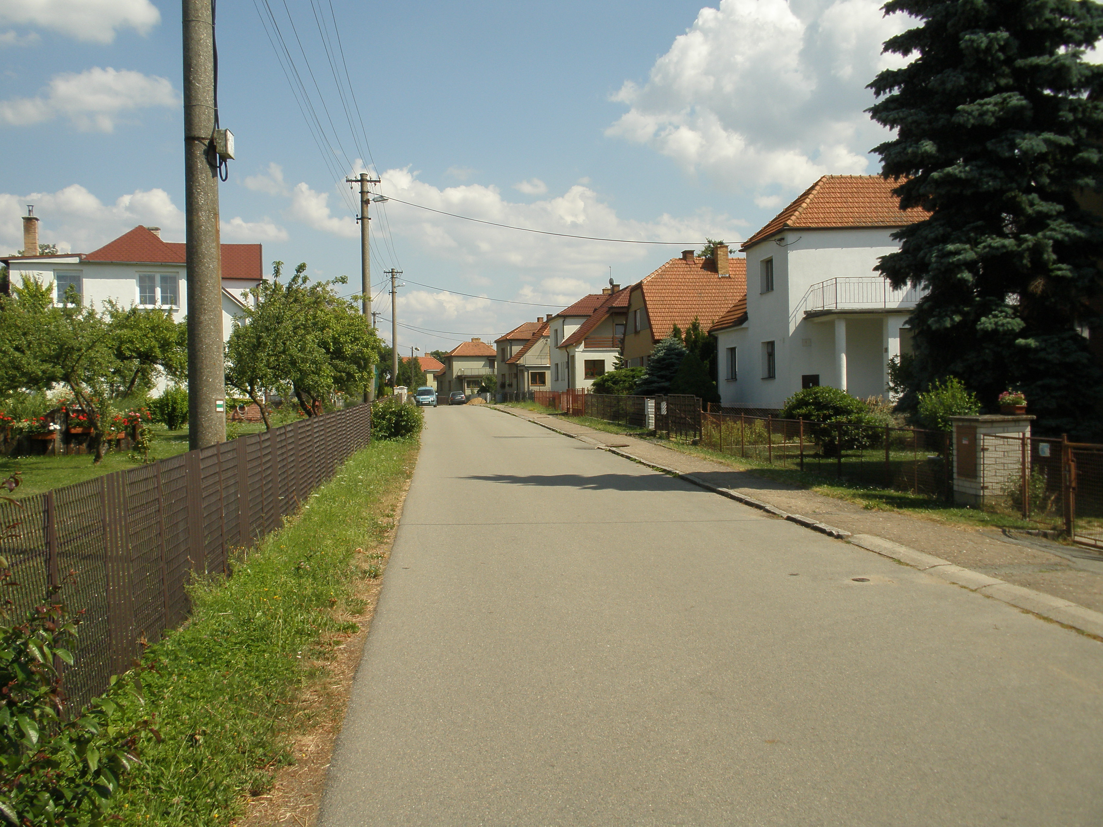 Nýrov, západní část obce